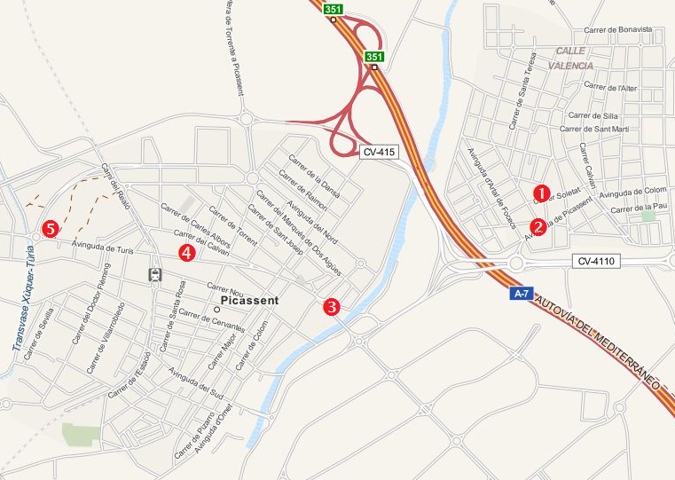 Crimen de Alcácer. Mapa de Picasent (a la izquierda) y Alcácer (a la derecha). (1) Ambulatorio de Alcácer; (2) Avenida Ricardo Hernández; (3) Gasolinera Mari; (4) Calle Padre Guaita; (5) Discoteca Coolor.